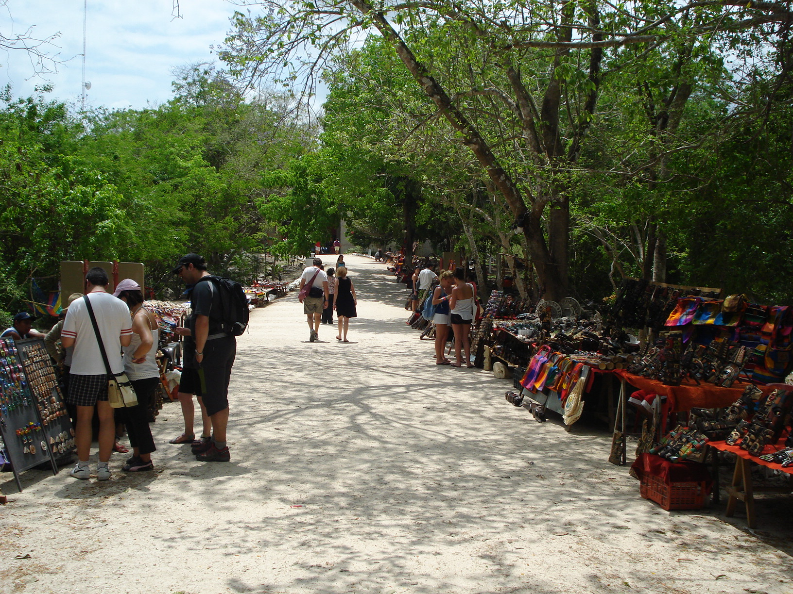 Zona Arqueológica de Chichen Itza, Yucatán, México.